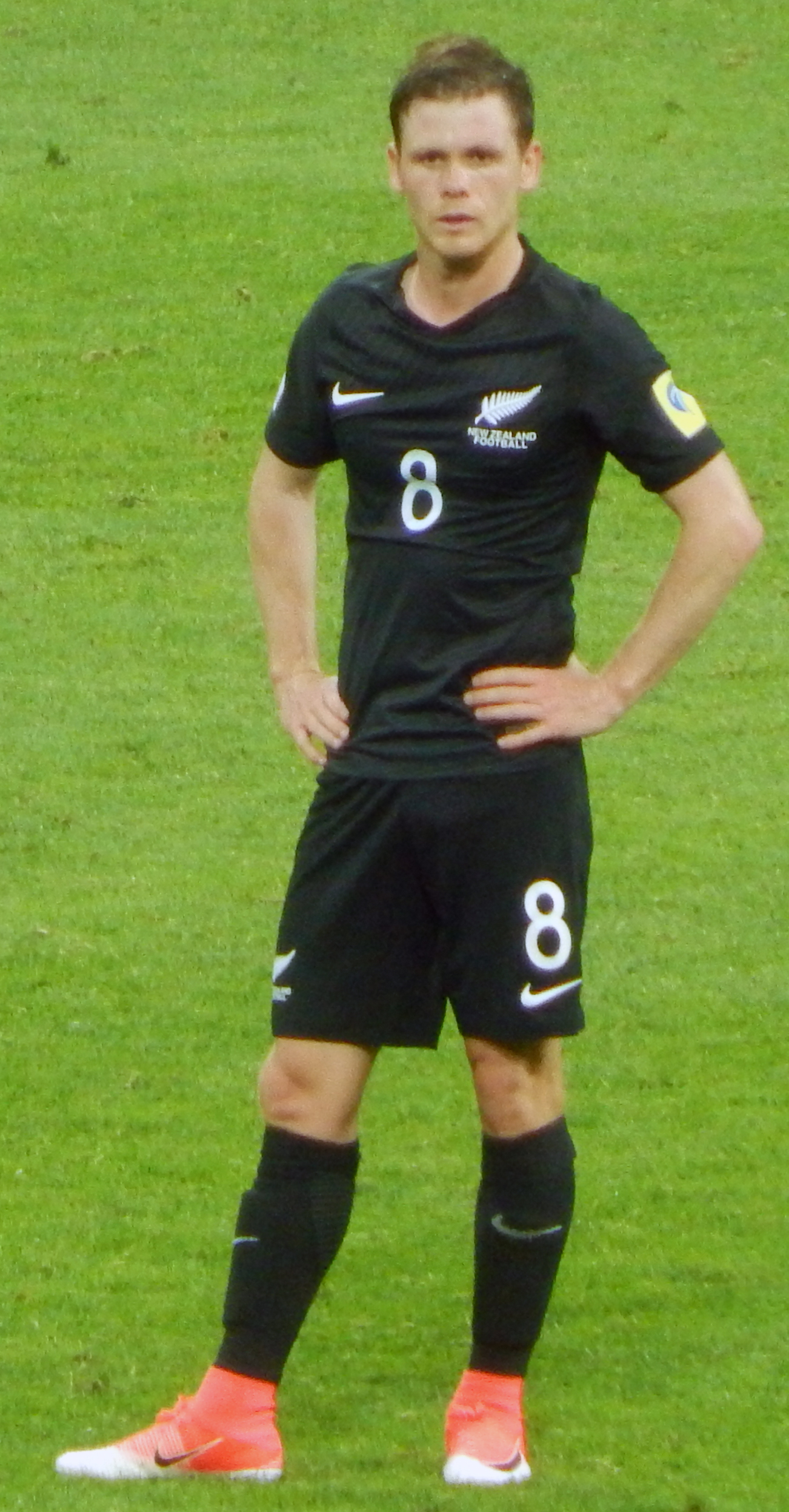 Майкл Макглинчи в матче против сборной Мексики